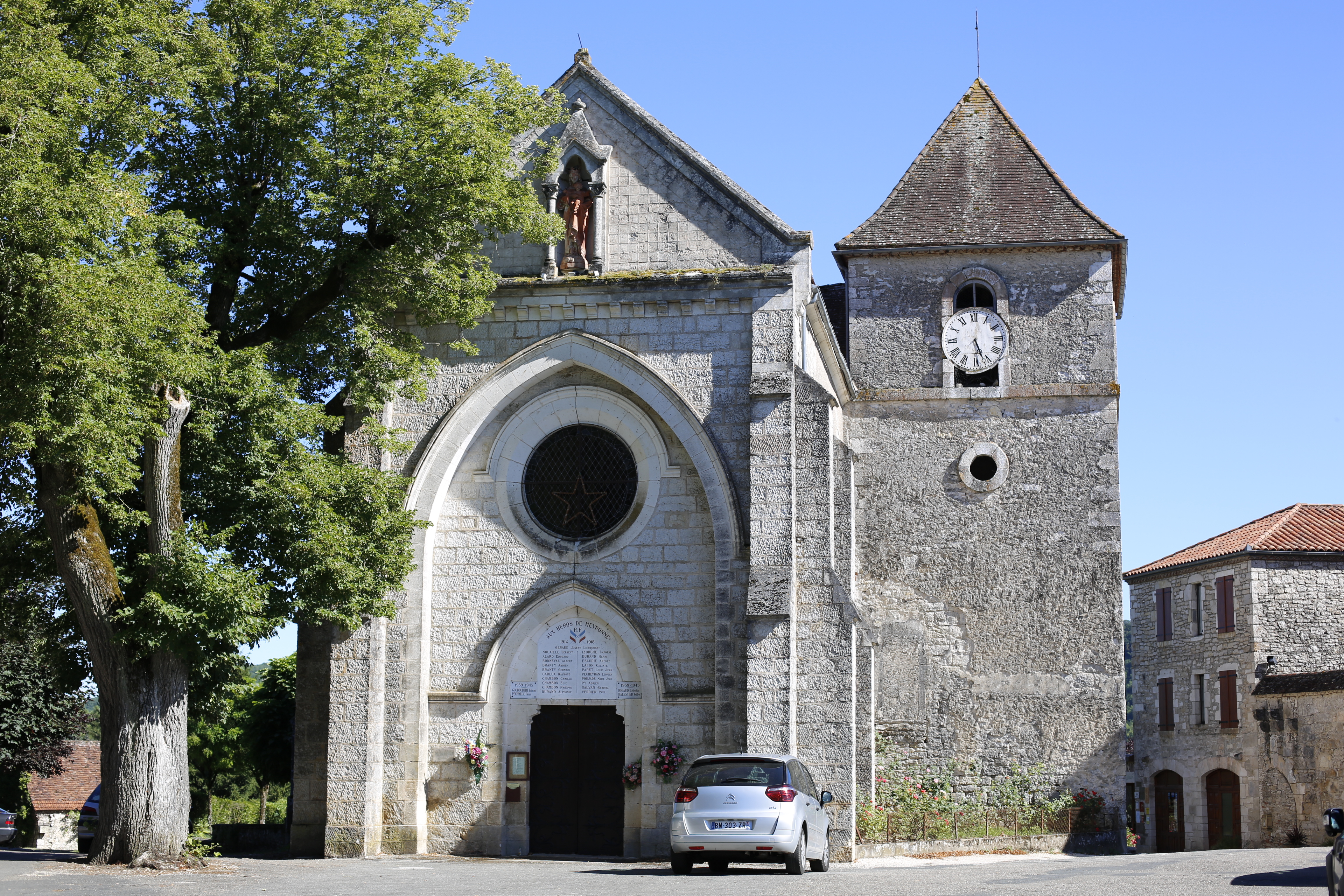 Église Saint-Sulpice de Meyronne : façade. .